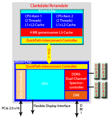 Schematische Darstellung einer Clarkdale/Arrandale-CPU